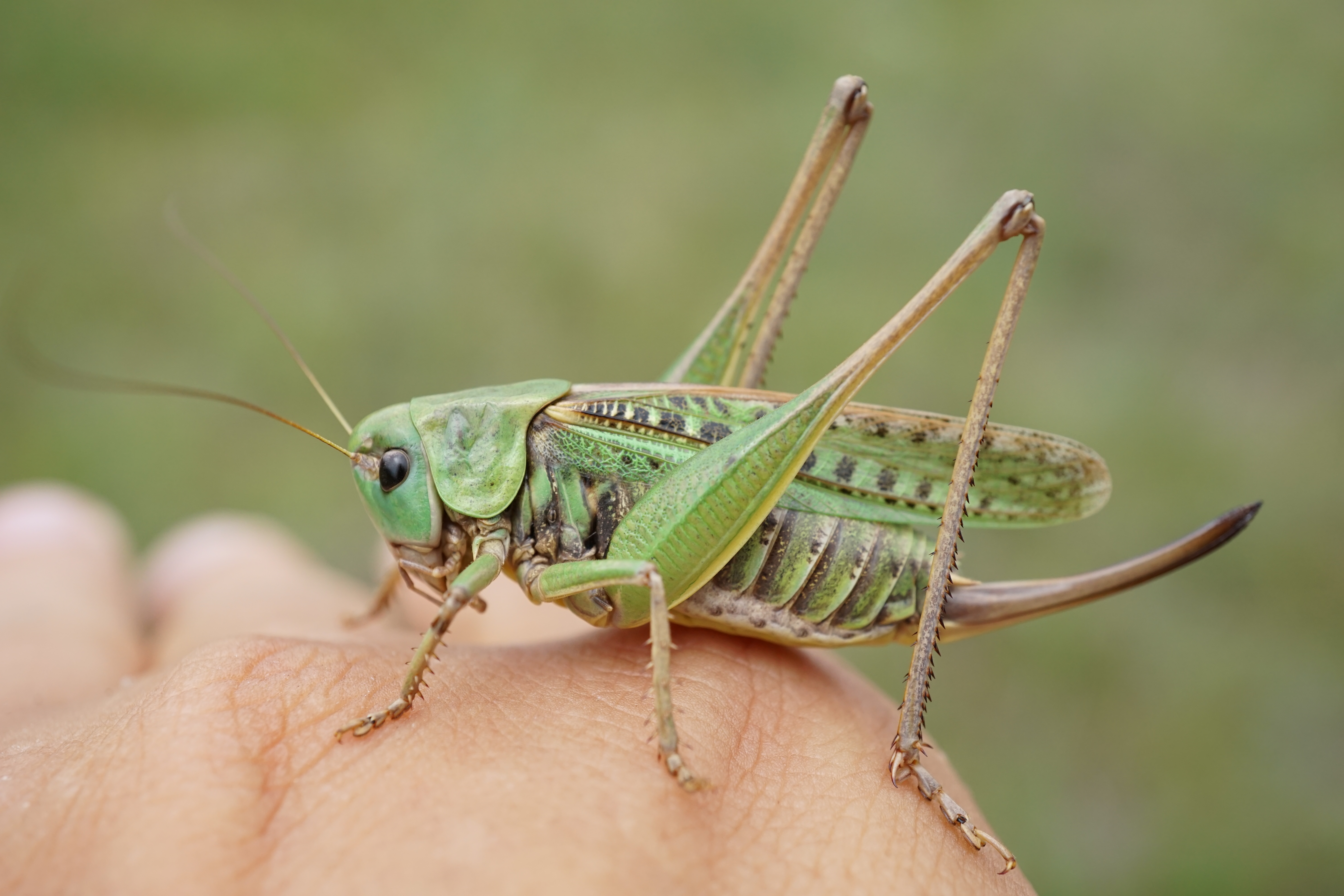 wart-biter Warzenbeißer